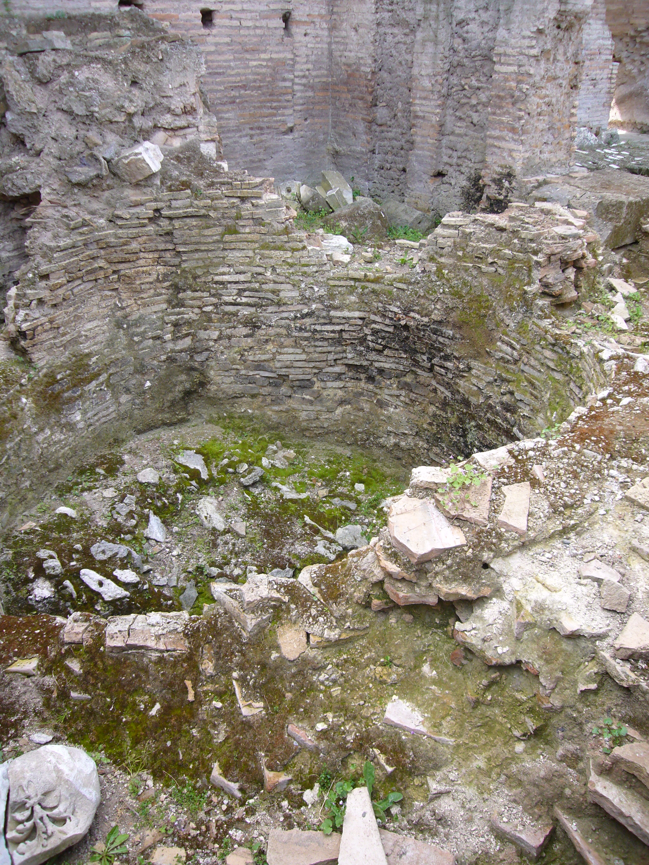 Roma, Villa dei Quintili: calcara (fornace per fabbricare calce da marmi antichi) installata nel tepidarium tra medioevo e rinascimento